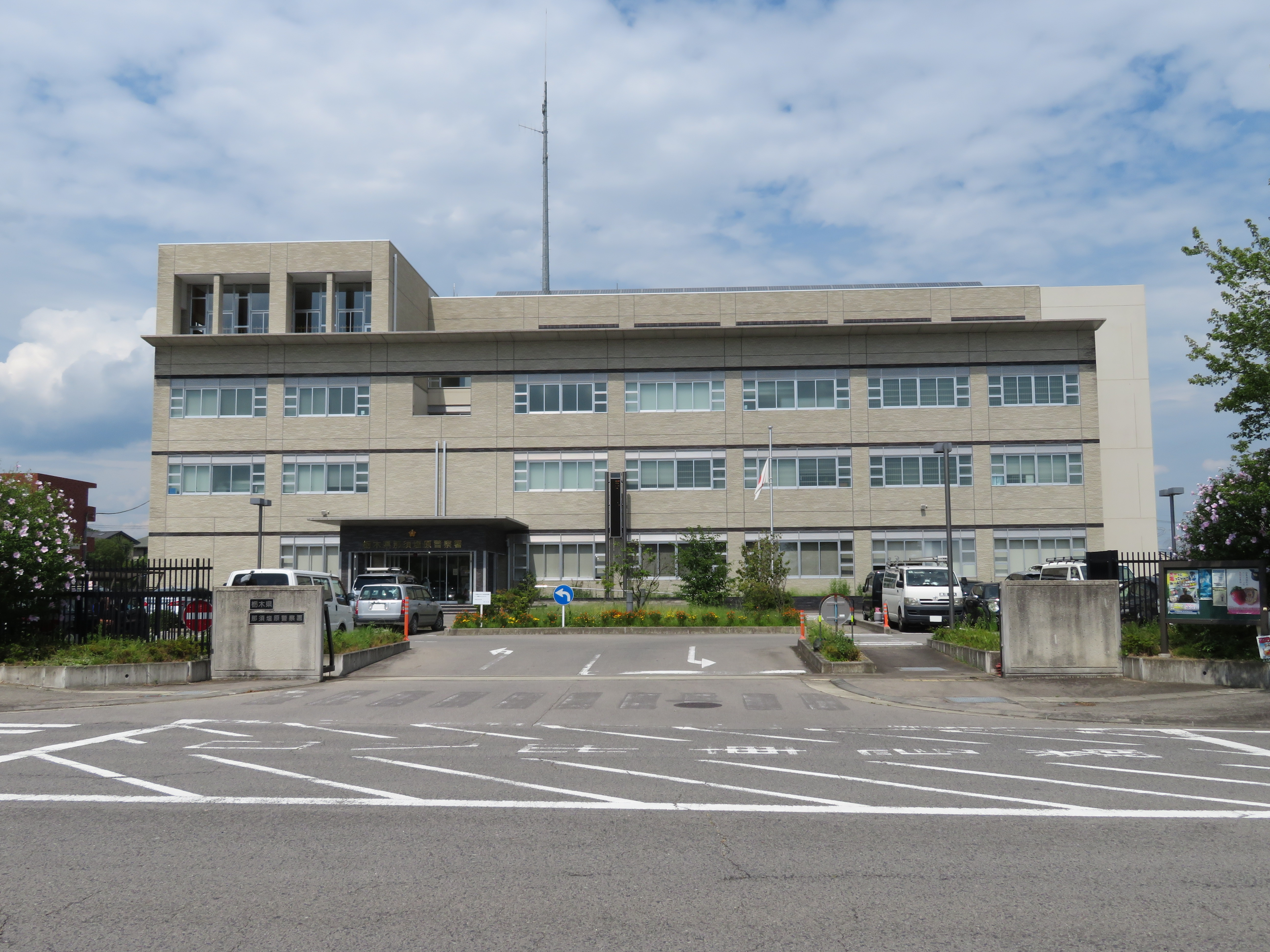 那須塩原市に所在する那須塩原警察署庁舎